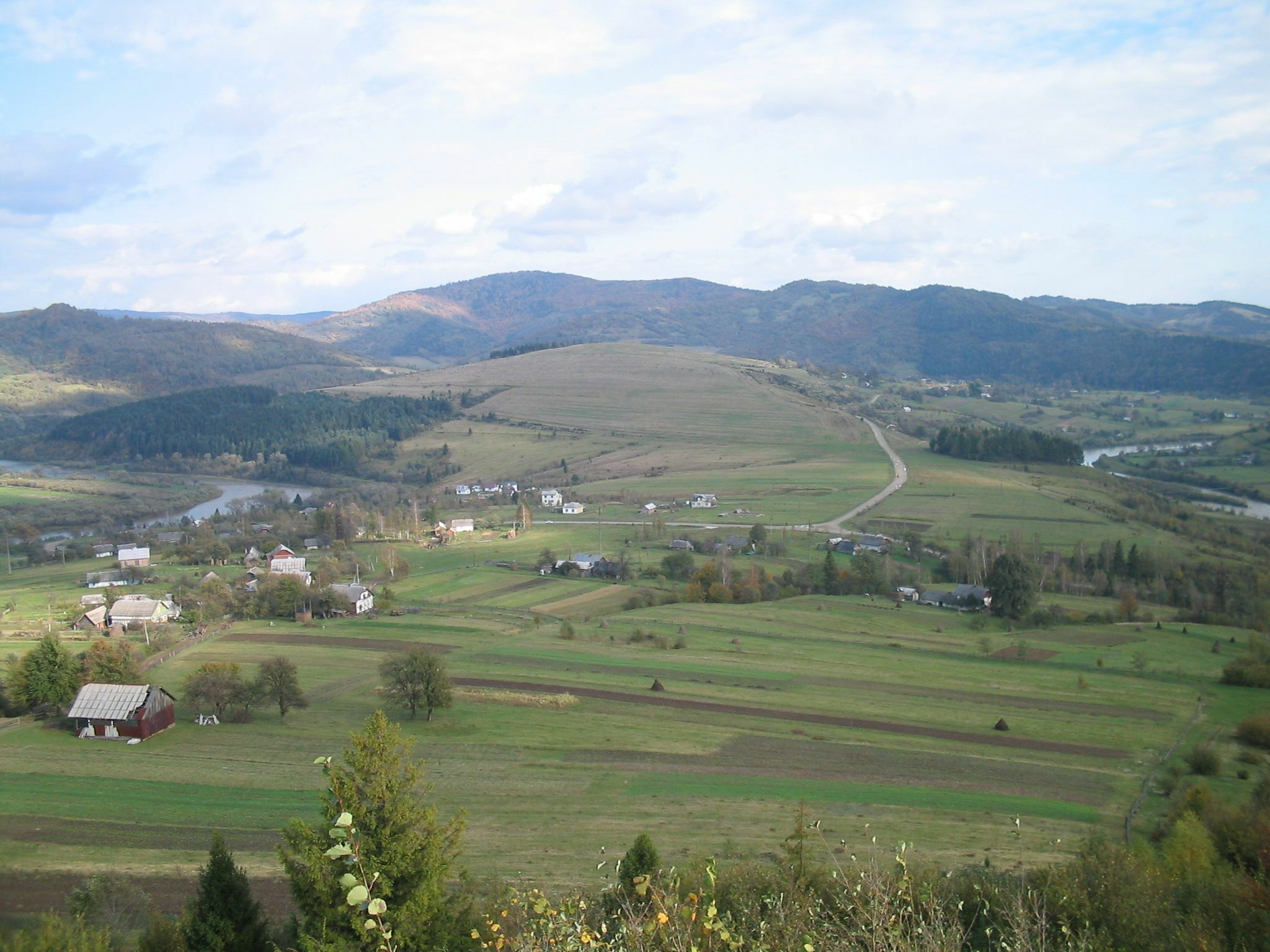 с. Рибник, Дрогобицький р-н